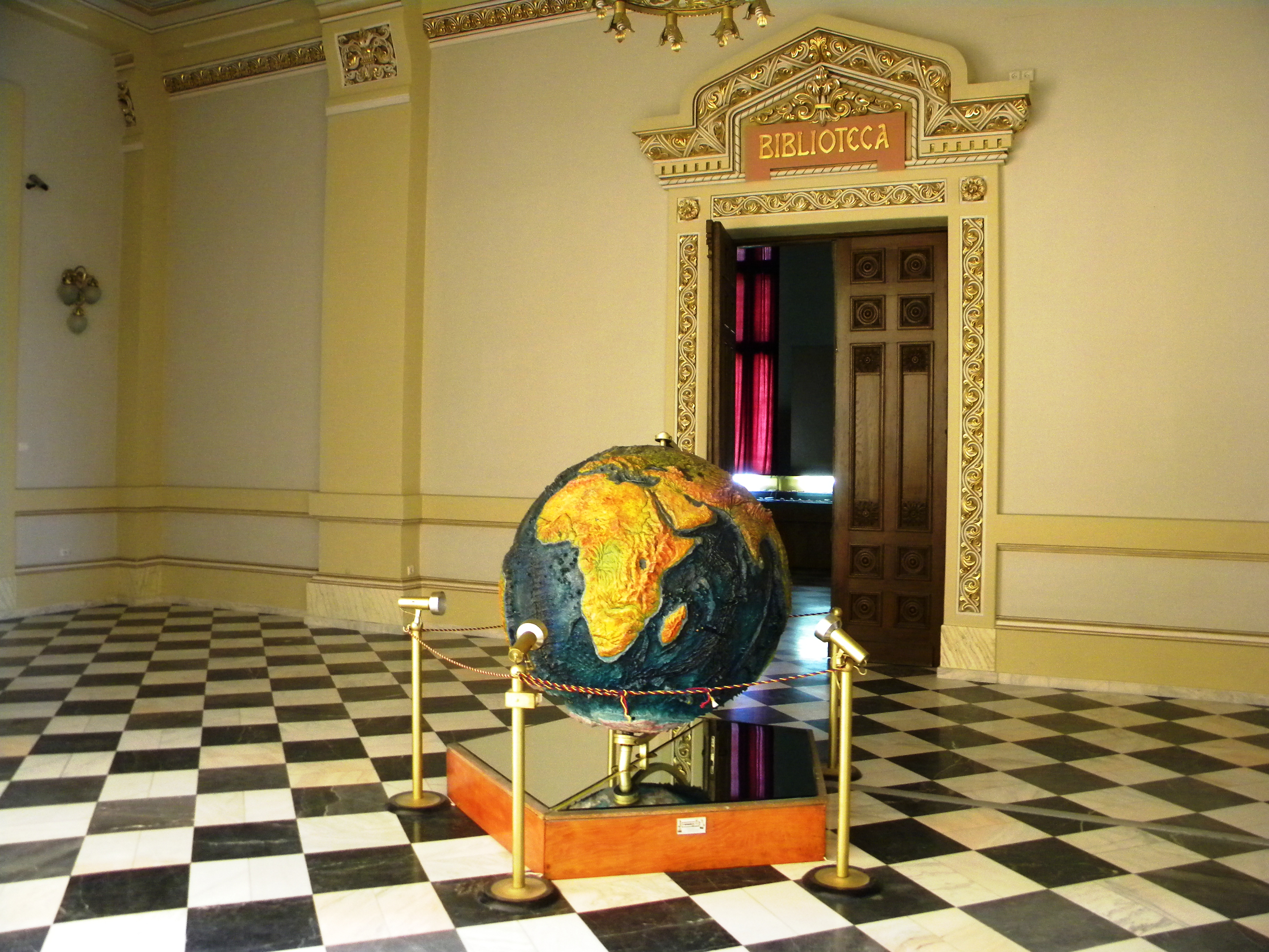 Bucuresti, Romania, Muzeul National de Geologie (interior 14); B-II-m-B-18984